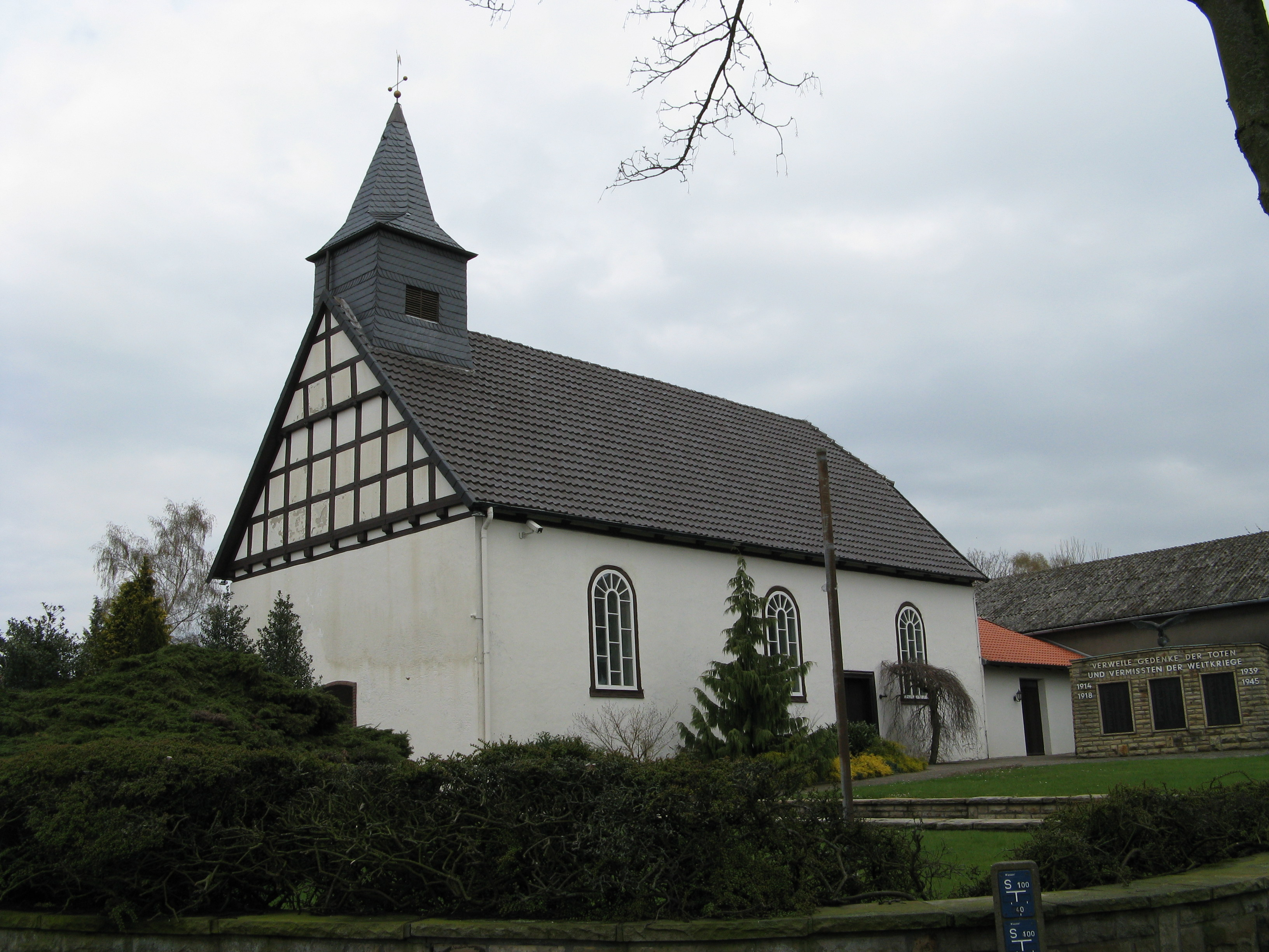 Kapelle in Haldem